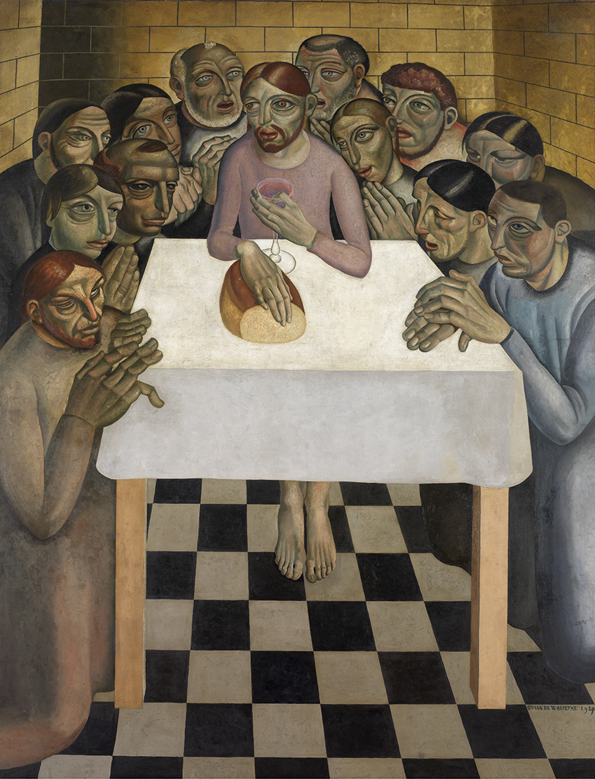 Laatste Avondmaal (Gustave van de Woestyne, 1927); collection: Musea Brugge - Groeningemuseum